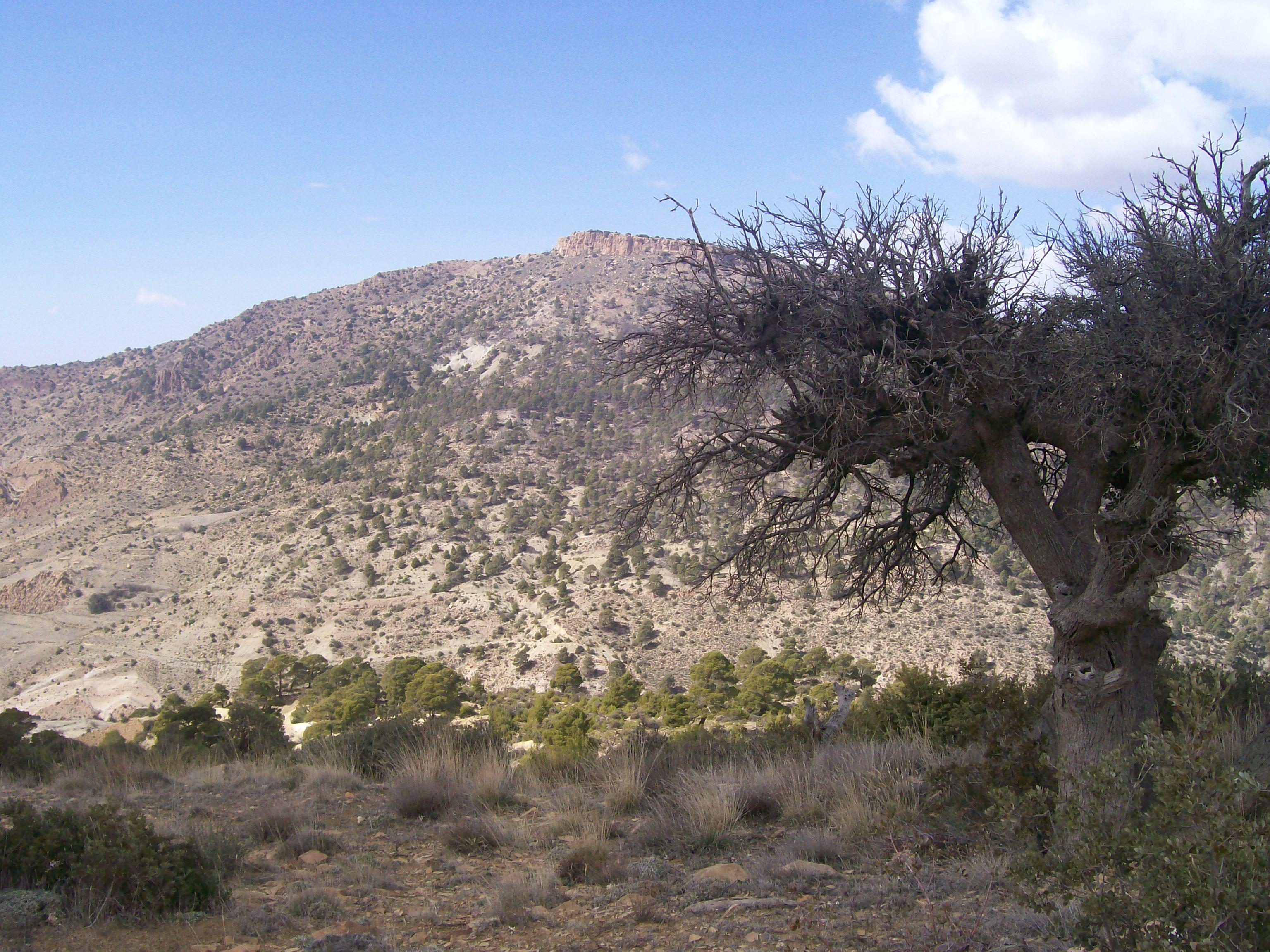 جبل ثوفيقث قلعة الثوار يحكي مآثر الثورة في لارباع. حدثت به عدة معارك أشهرها معركتي ثوفيقث الأولى والثانية وهو محاط بثلاث قرى ثورية ثيبحرين و ثاعزونت و ثاقليعث كانت حصونا للثورة ومراكز لها